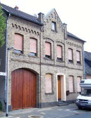 Das so genannte Schlosserhaus in Bergheim- Thorr.